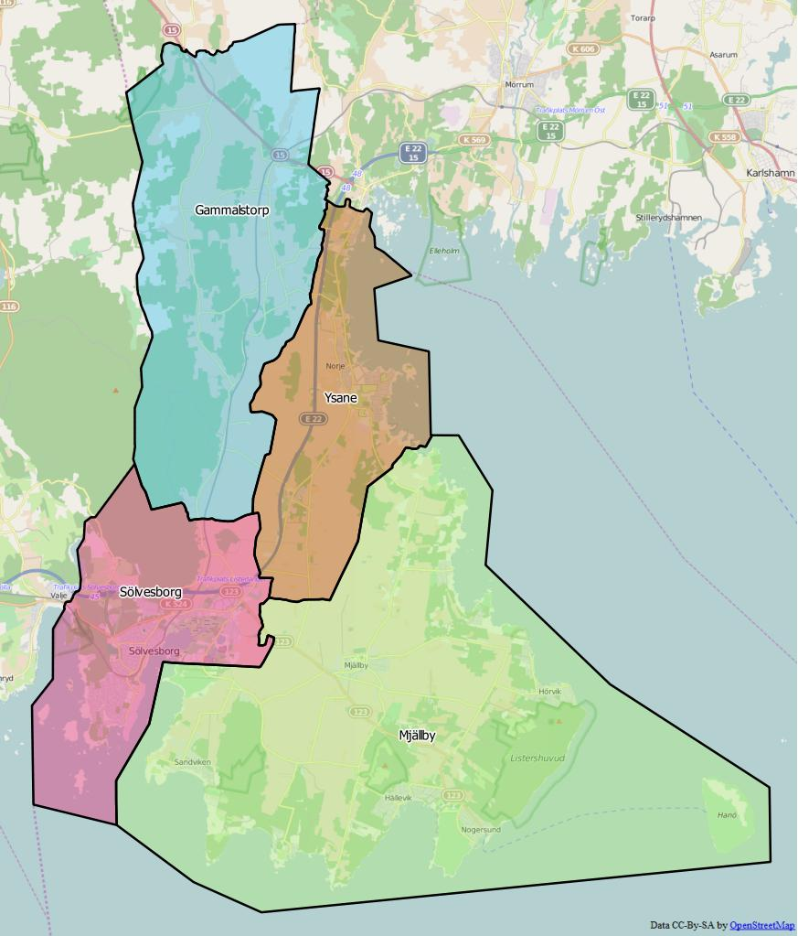 Distriktsindelningen i Sölvesborgs kommun World file: 45.76907744159228031 0 0 -45.76907744159228031 1616126.61987510742619634 7601032.98988405149430037